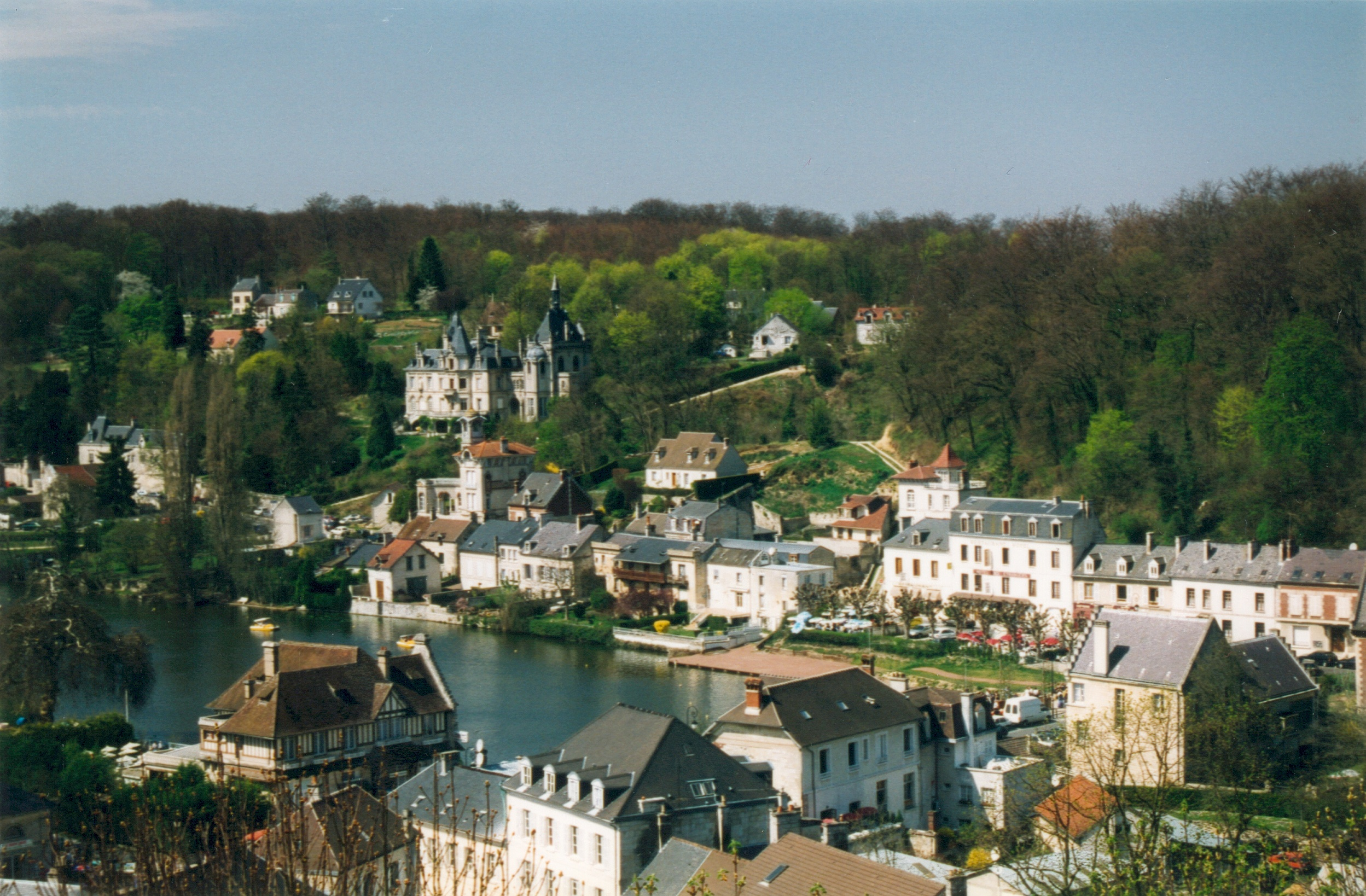 Pierrefonds Oise France Vue depuis le château Photographie prise par Patrick GIRAUD